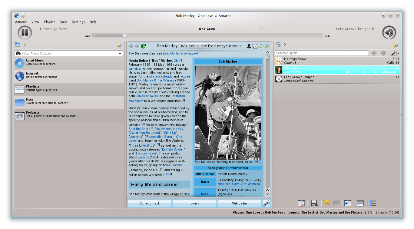 Captura del reproductor Amarok 2.4 en KDE 4.6.2. Desarrolladores de Amarok